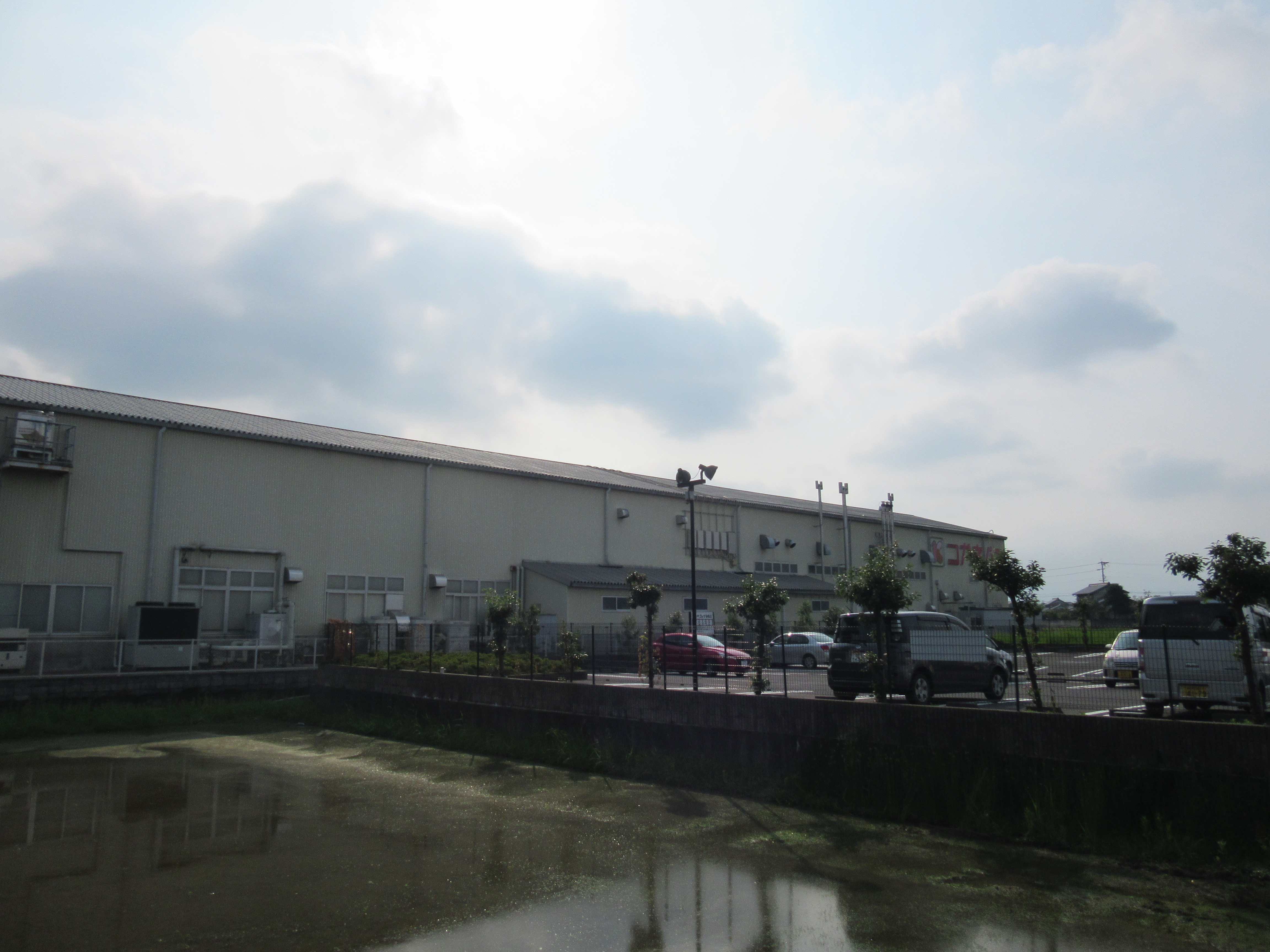 コガネパン